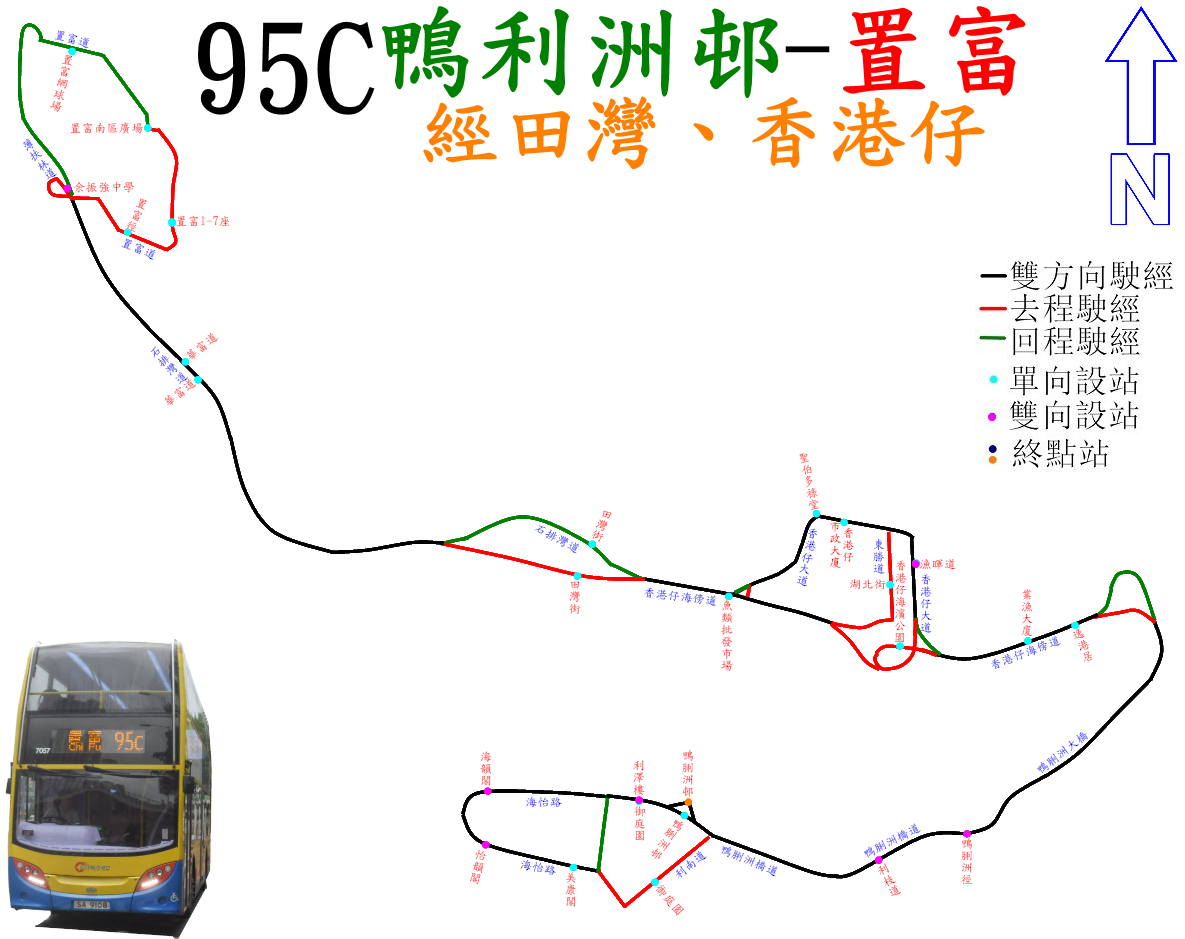 中文（香港）: 城巴95C線的走線圖